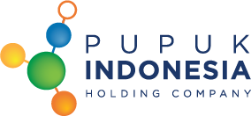 Logo dari PT Pupuk Indonesia (Persero)